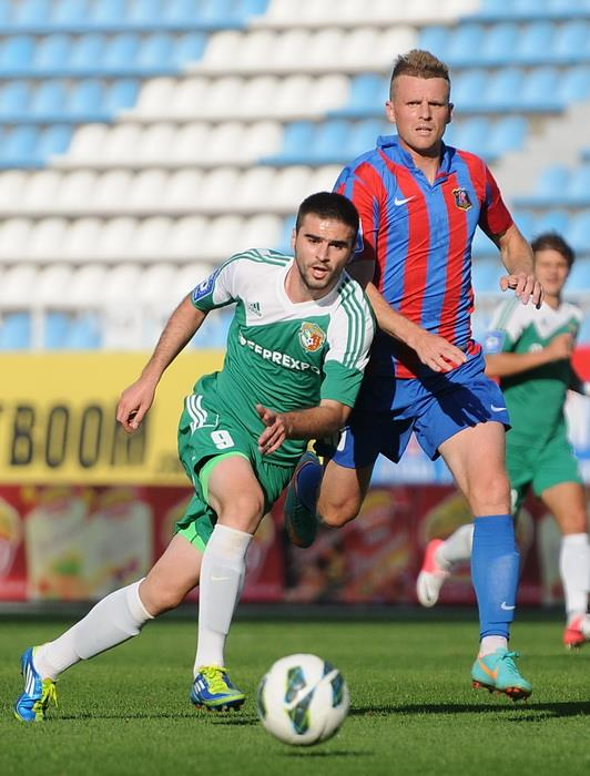 Володимир Аржанов 3 серпня 2013 року у матчі проти полтавської Ворскли.